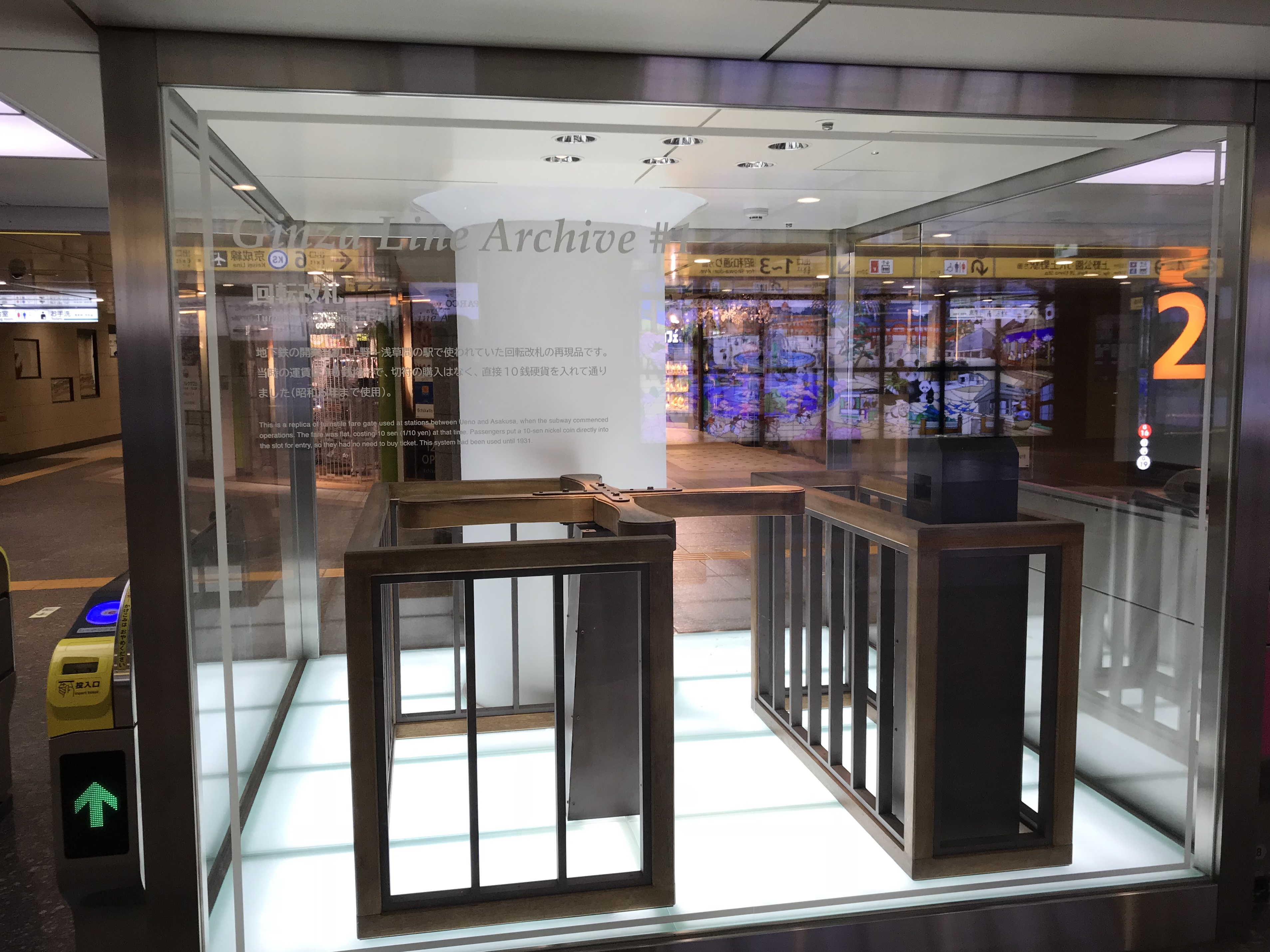 東京メトロ銀座線上野駅JR上野駅方面改札口手動改札モニュメント